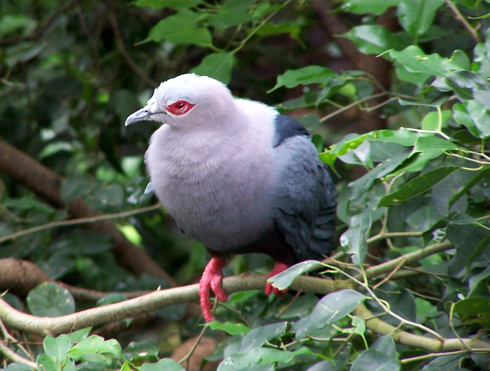 Ducula pinon / Pinon Imperial PigeonKiss in Ur Eye